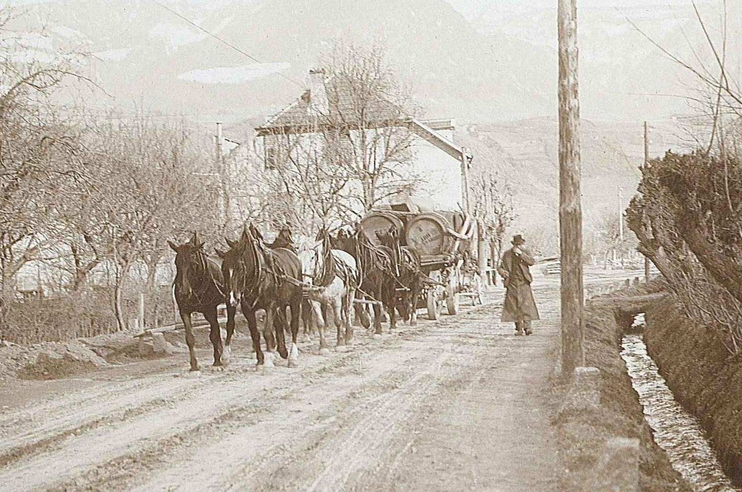 Charrette à Meran (Autriche, aujourd'hui Italie), route de Vorst. Photosphère français, Anastigmat Zeiss